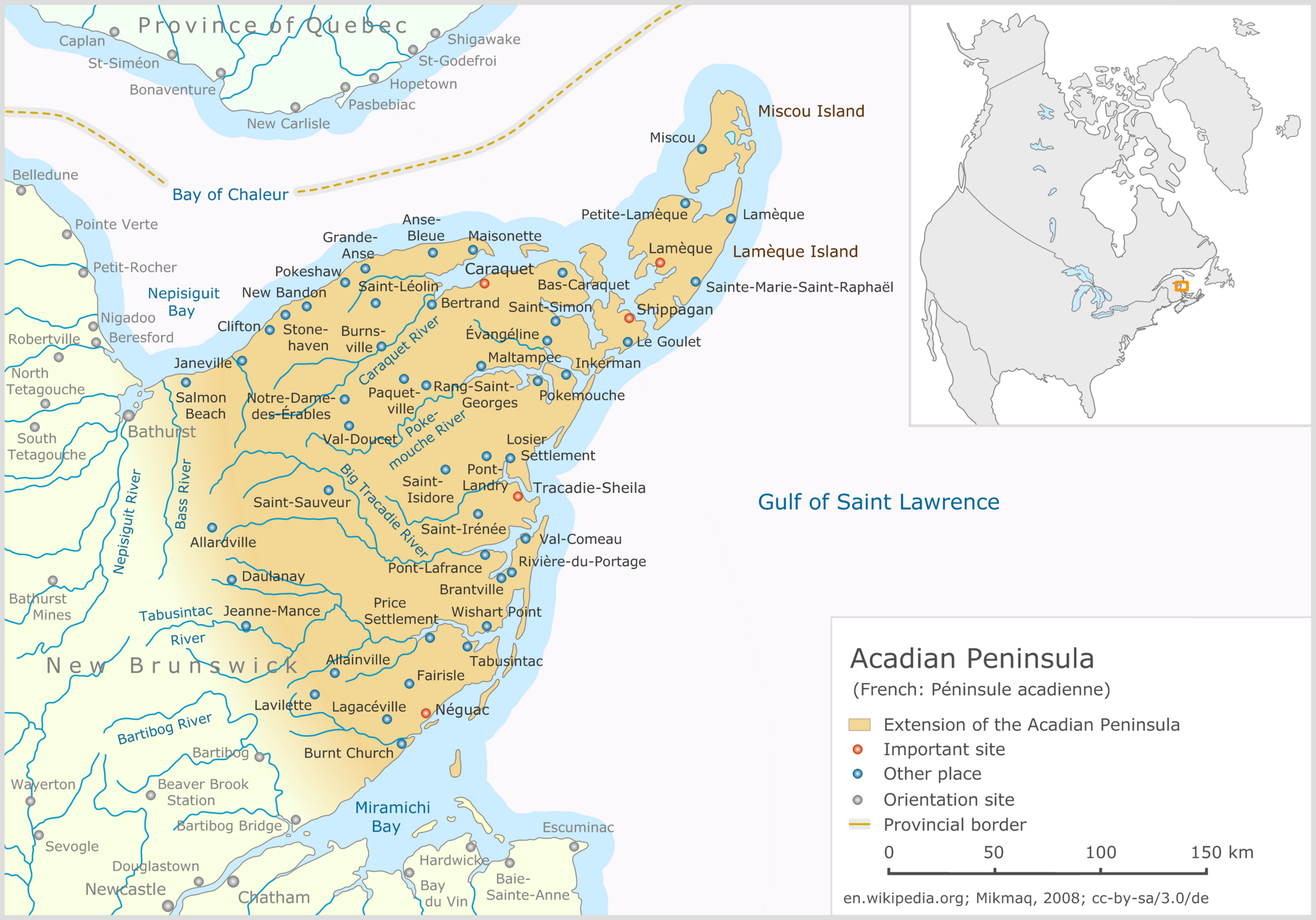 Acadian Peninsula